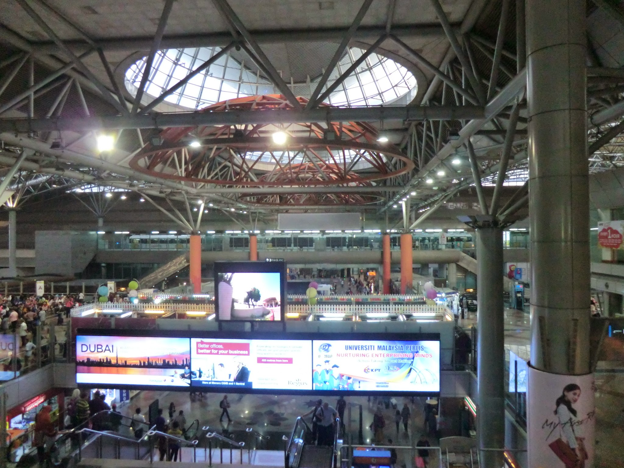 Kampung Datuk Keramat, Kuala Lumpur, Federal Territory of Kuala Lumpur, Malaysia